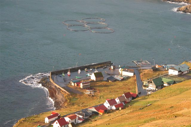 Hov